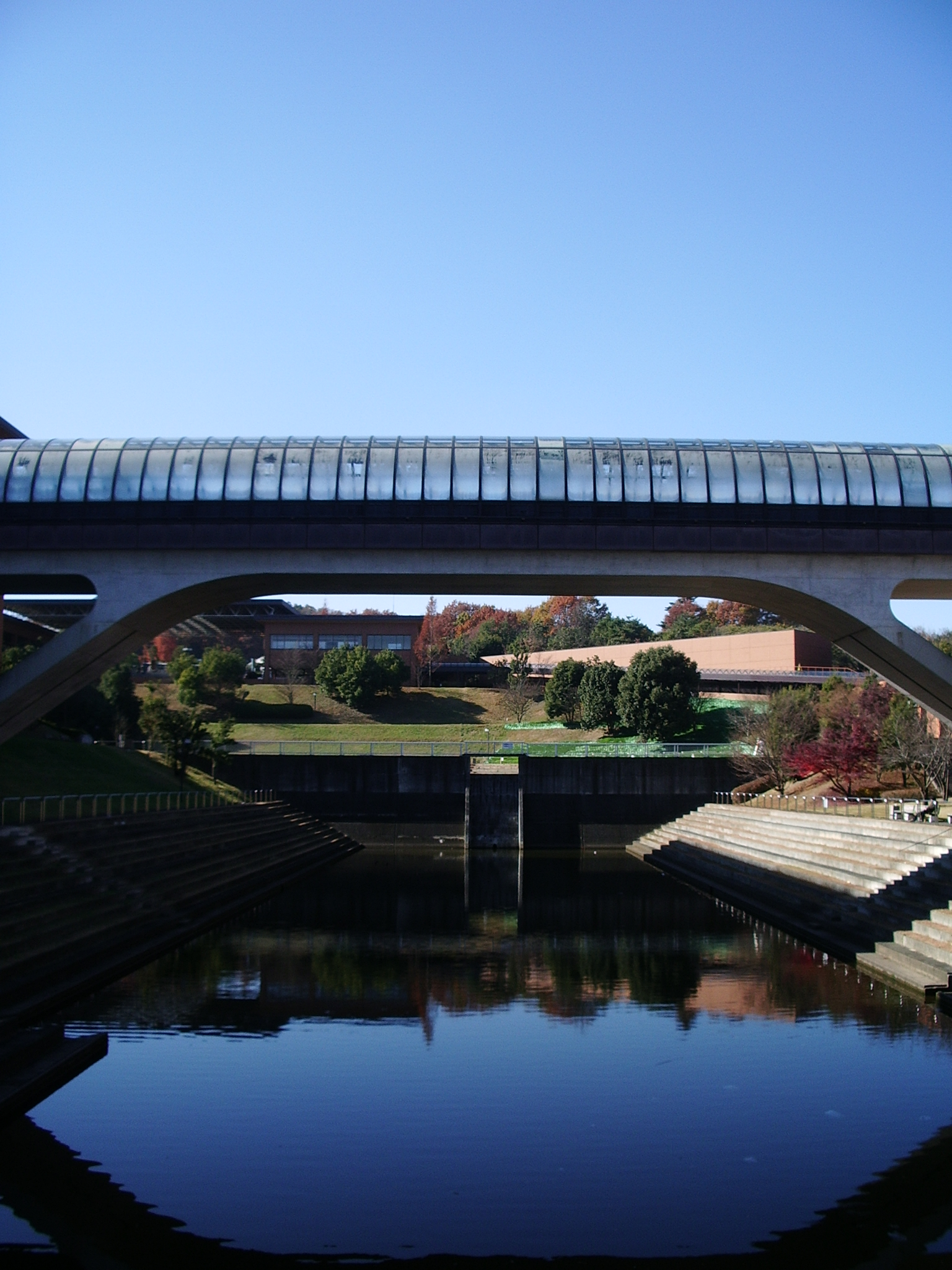 Daito Bunka University